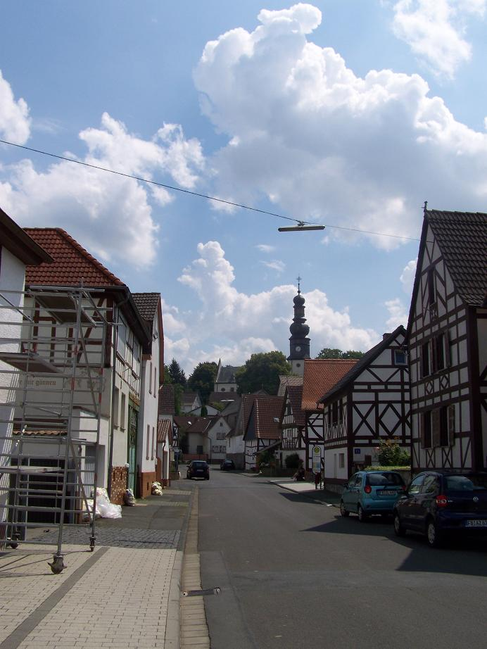 Die Untergasse